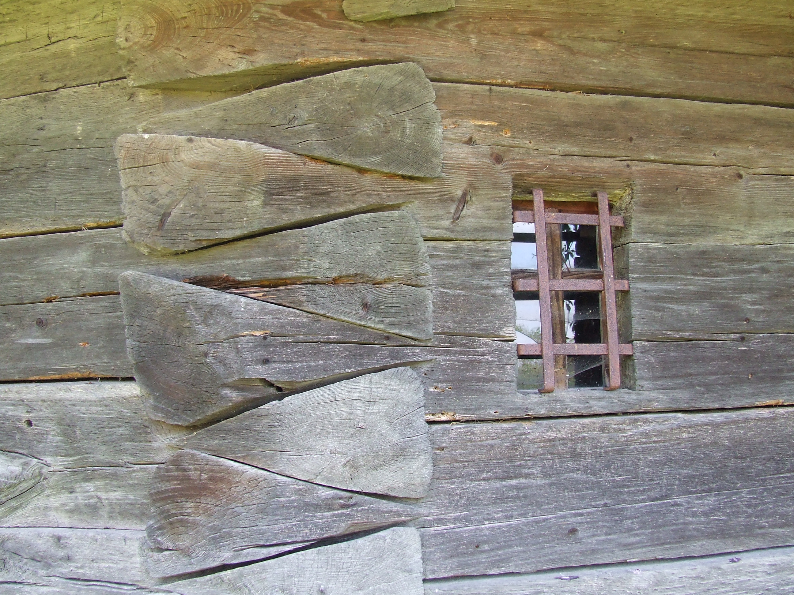 Biserica de lemn din Nadăşa, judeţul Mureş. Îmbinare